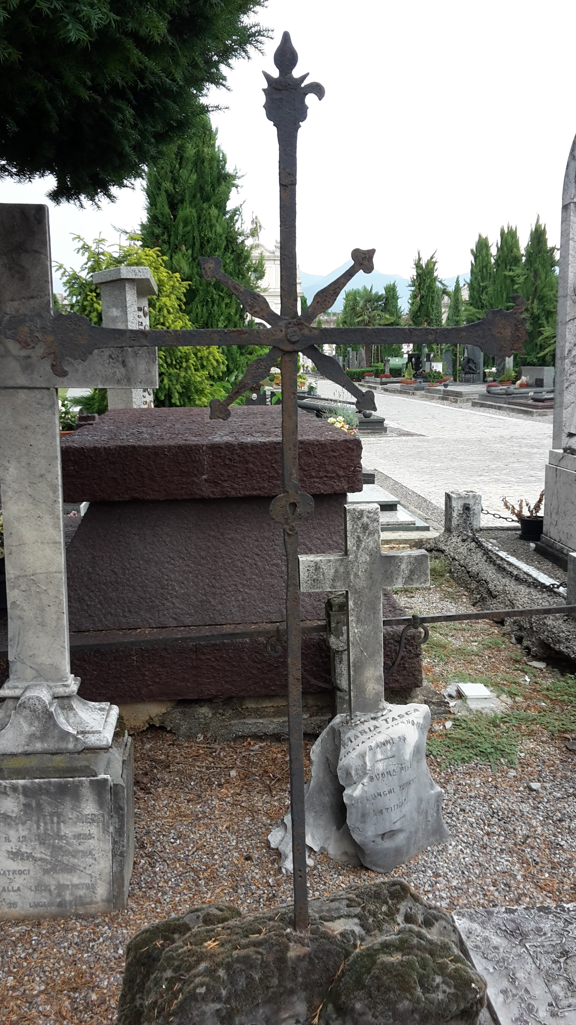 Крест с купола несуществующей ныне церкви Мертвых на Гальке ныне установлен на могиле графа Джулио Таска на кладбище в Сериате